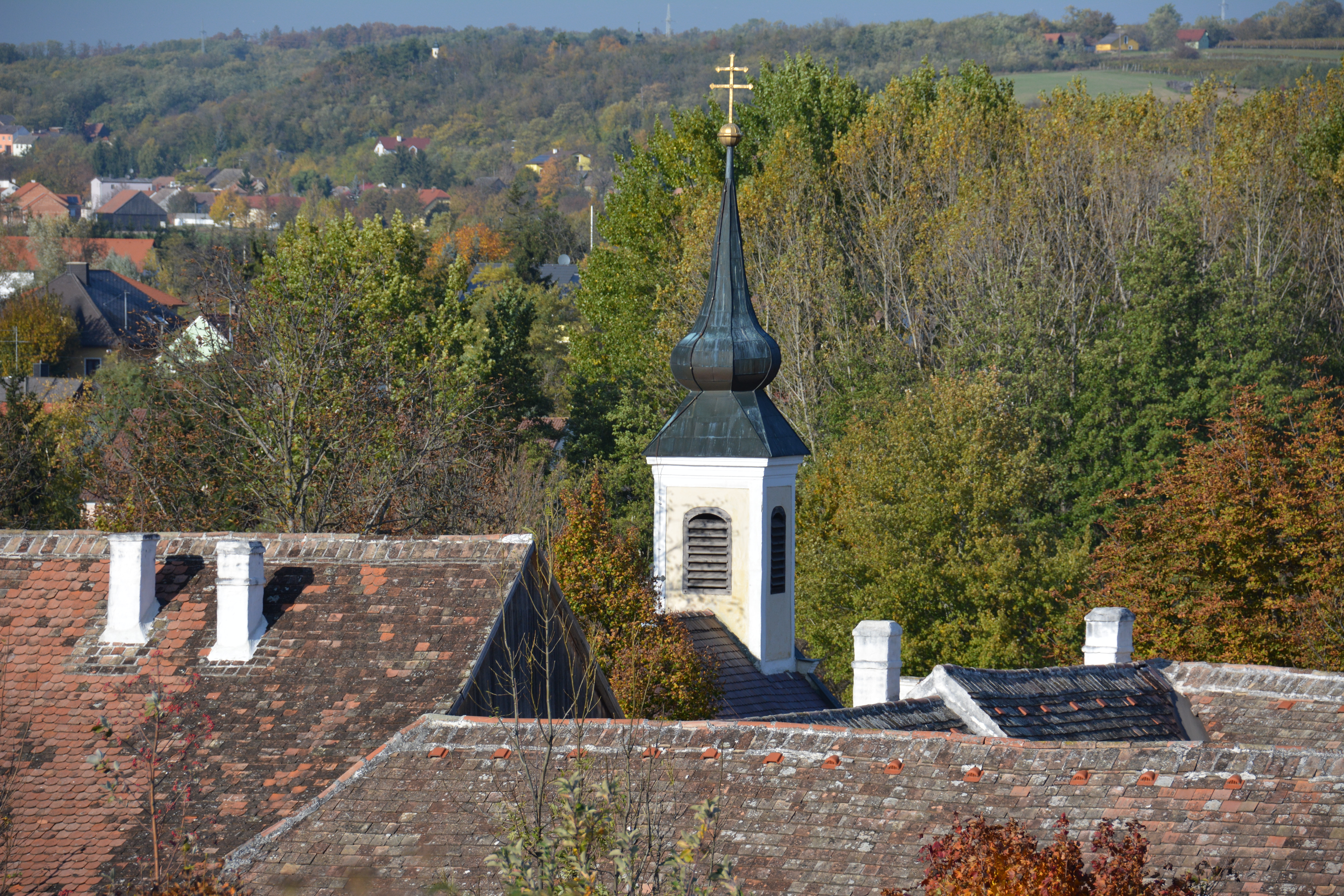 Museumsdorf